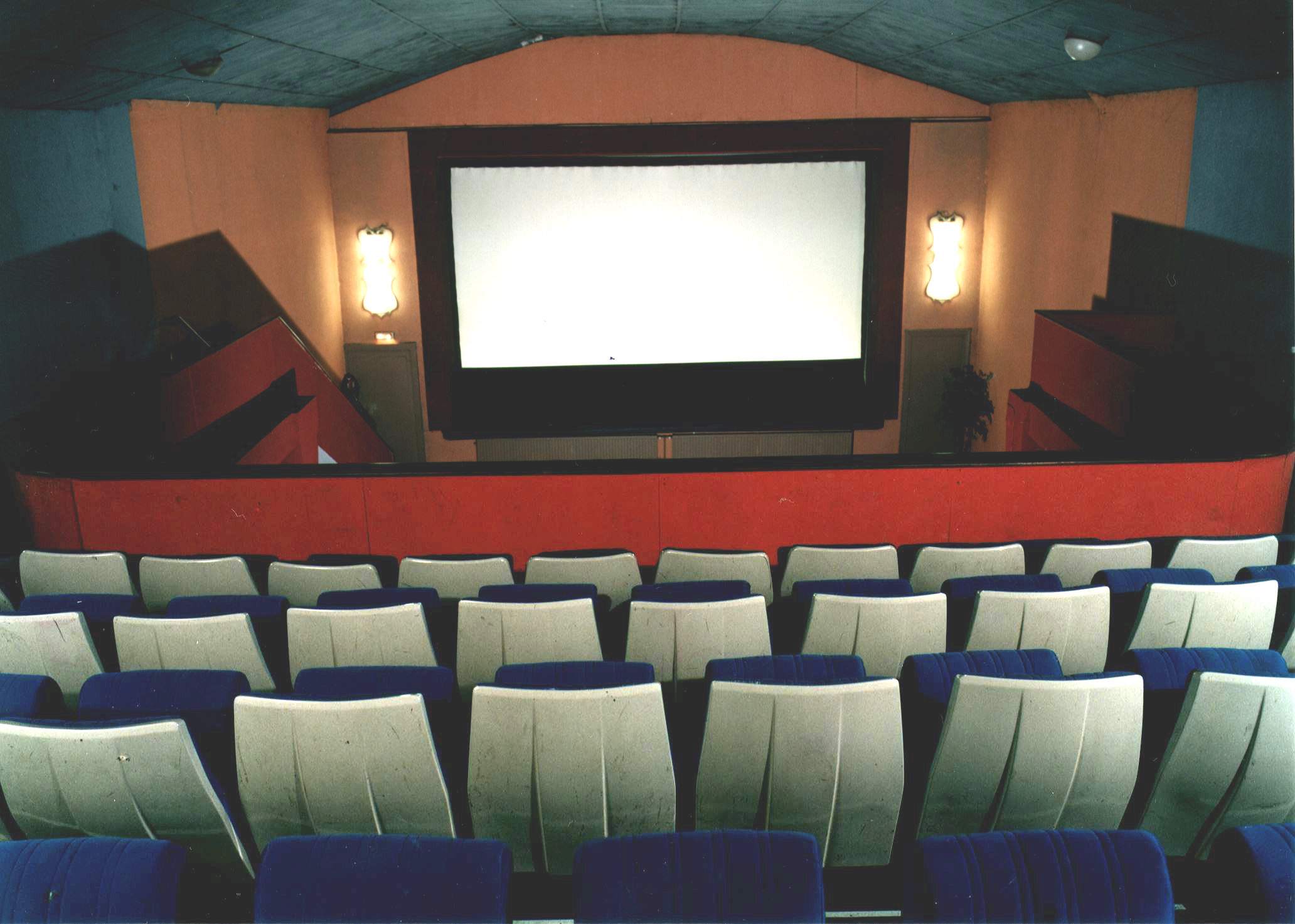 Kursaal - De Balkon haut